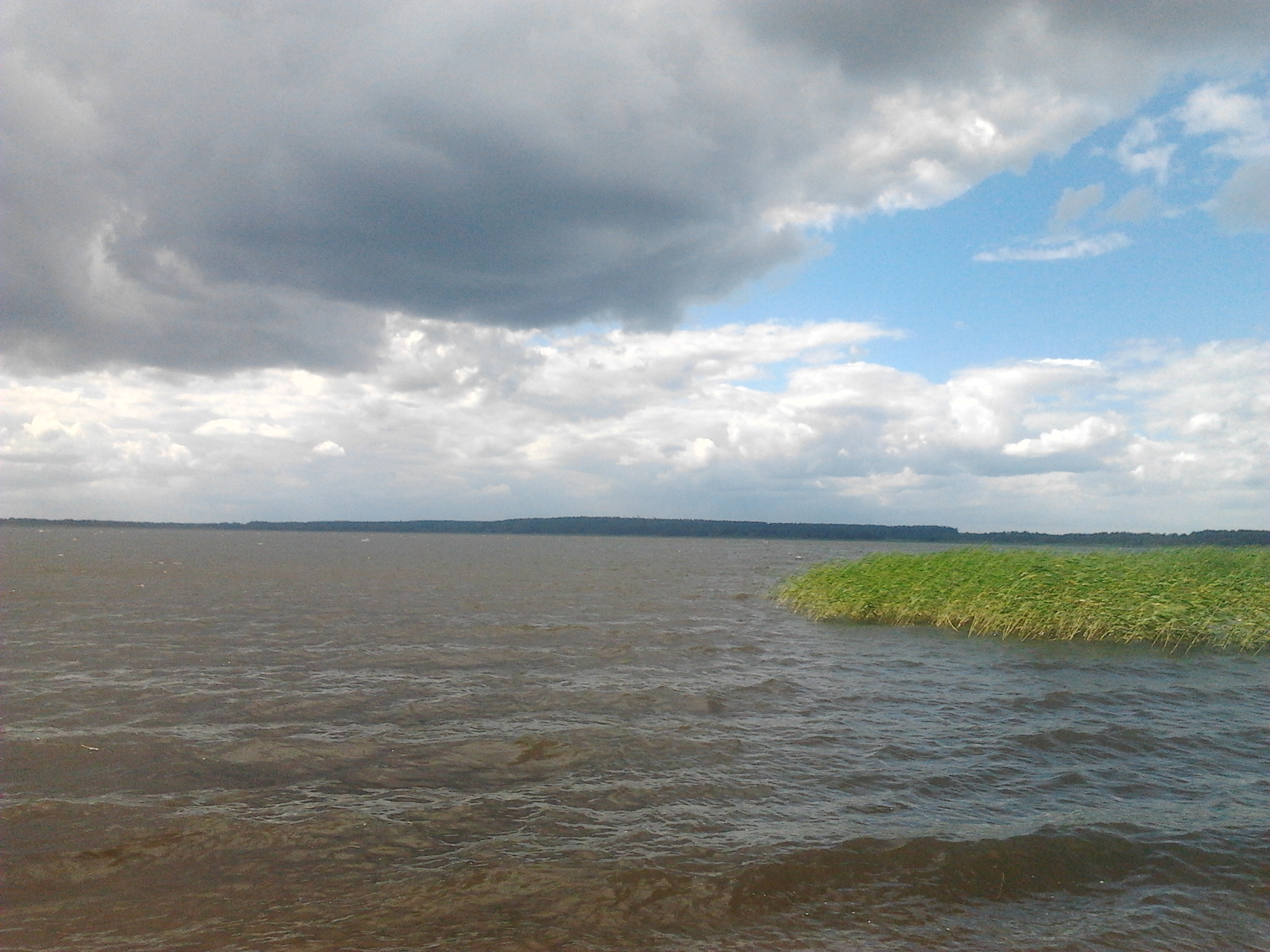 A Vagula-tó látképe kelet felől, Voru megyében.